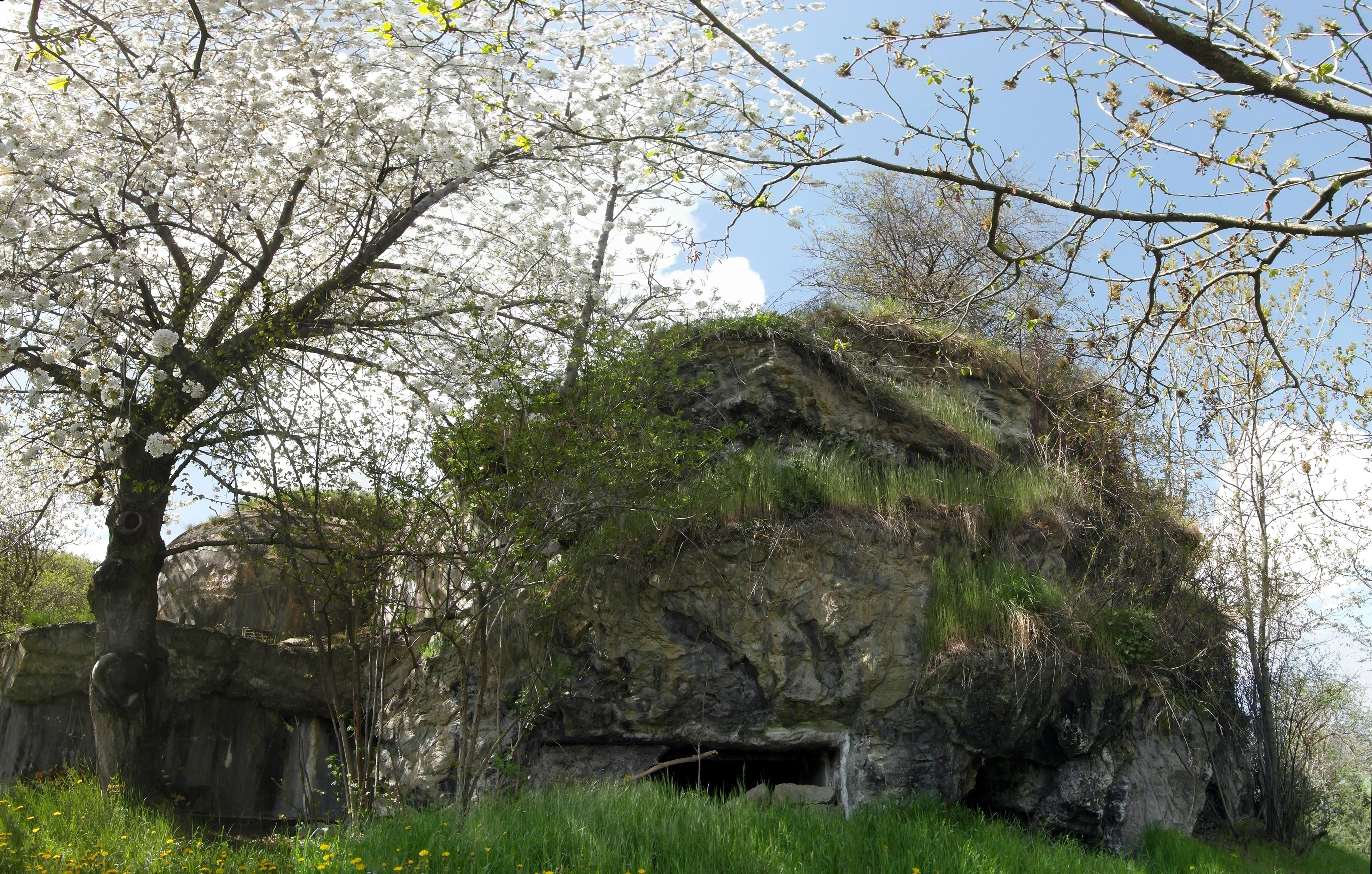 Opera 22 Sciaves